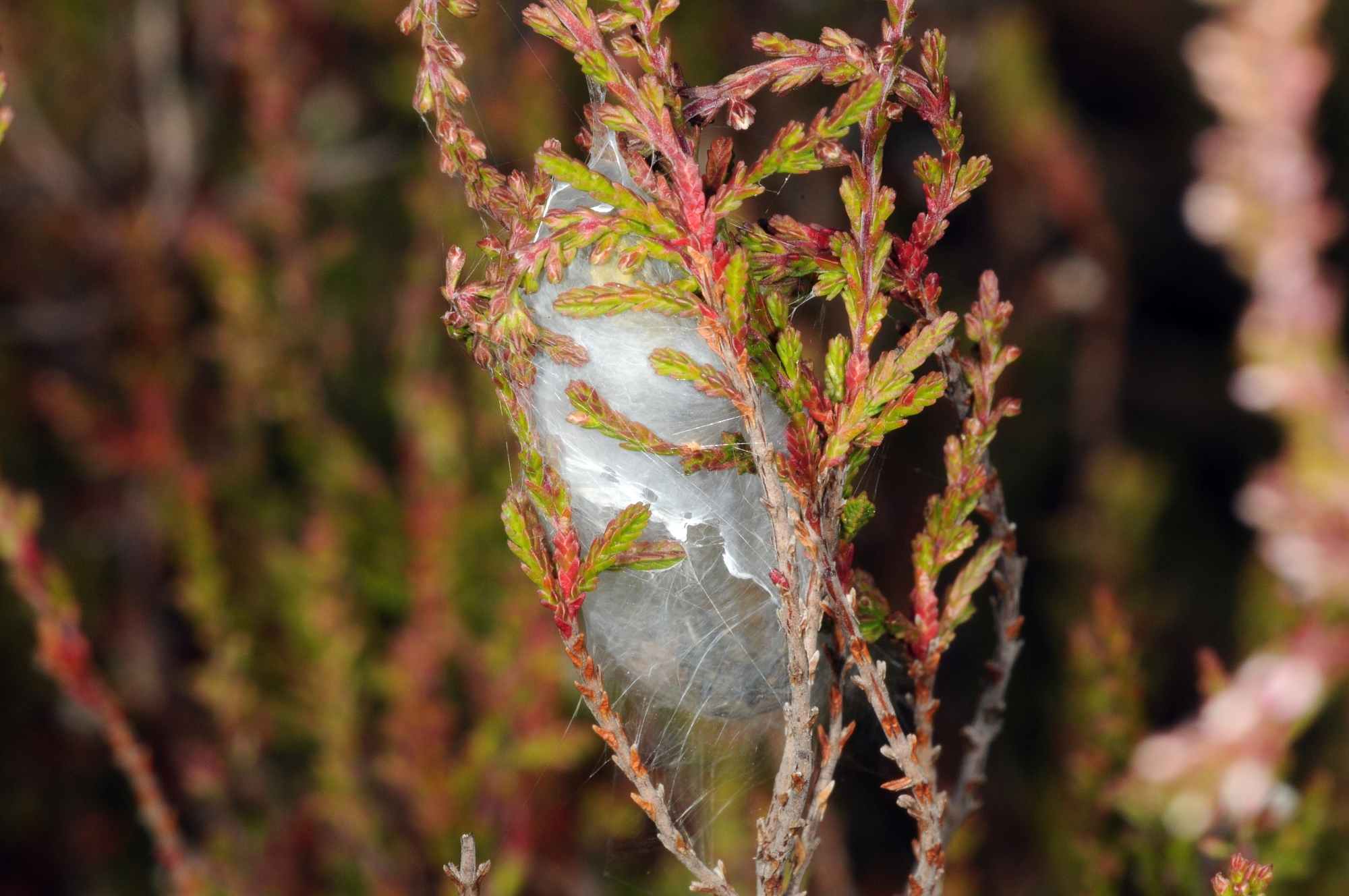 Cheiracanthium punctorium, Wohngespinst, Stromtrasse bei Kelsterbach - neben Startbahn West, Hessen, Deutschland